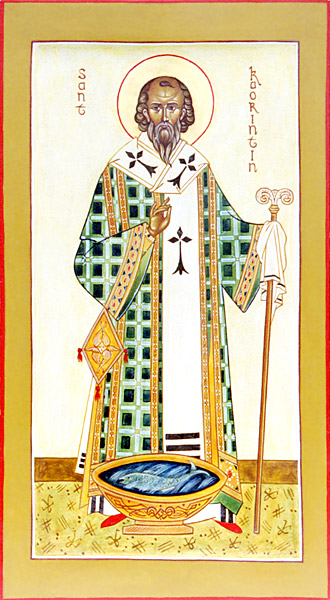 L'icône de St. Corentin (Kaourintin) peinte pour l'Association orthodoxe sainte Anne (Bretagne).